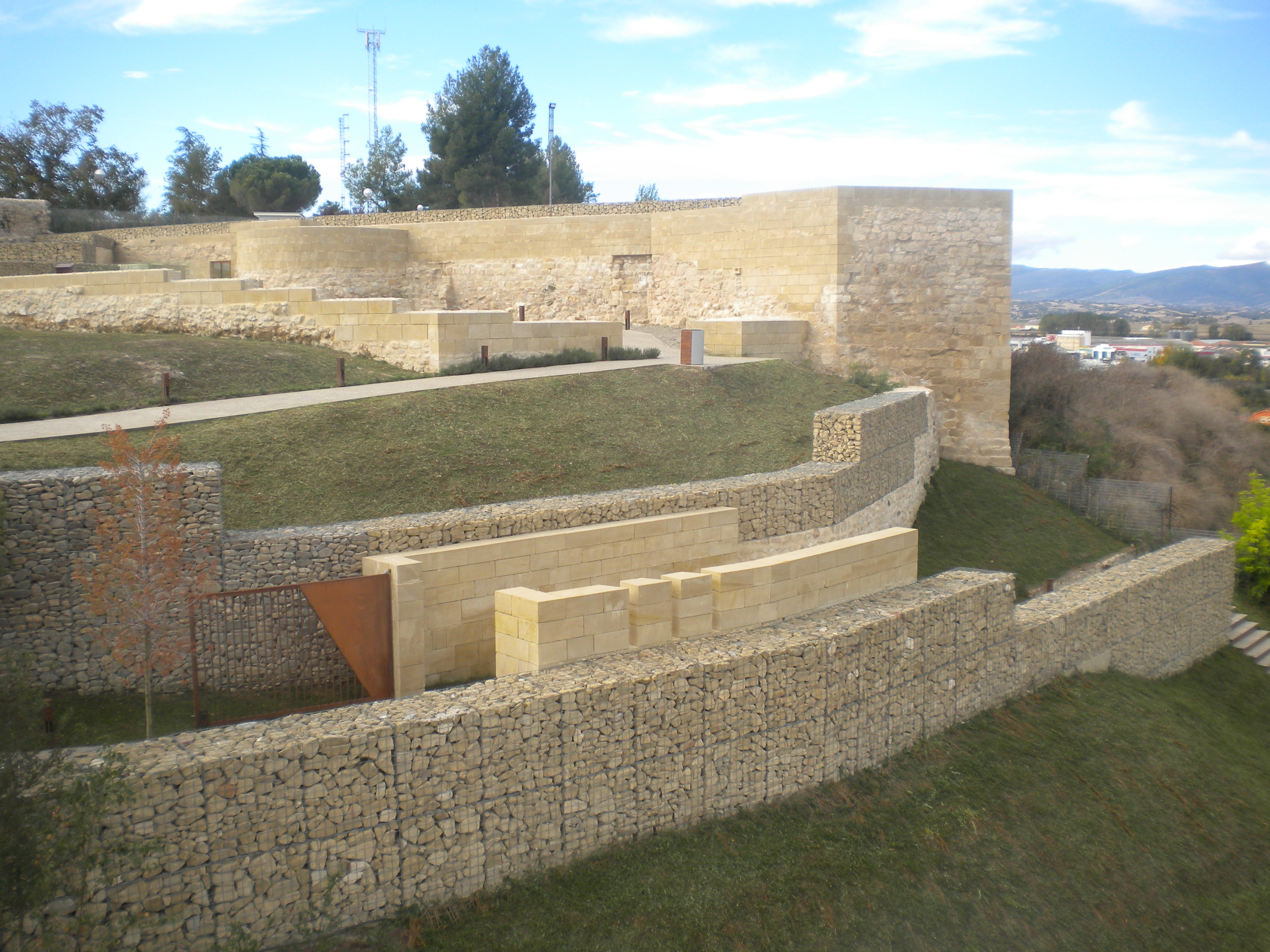 Vista del laberinto y acceso a la barbacana del Castillo de Miranda de Ebro (Castilla y León, España)